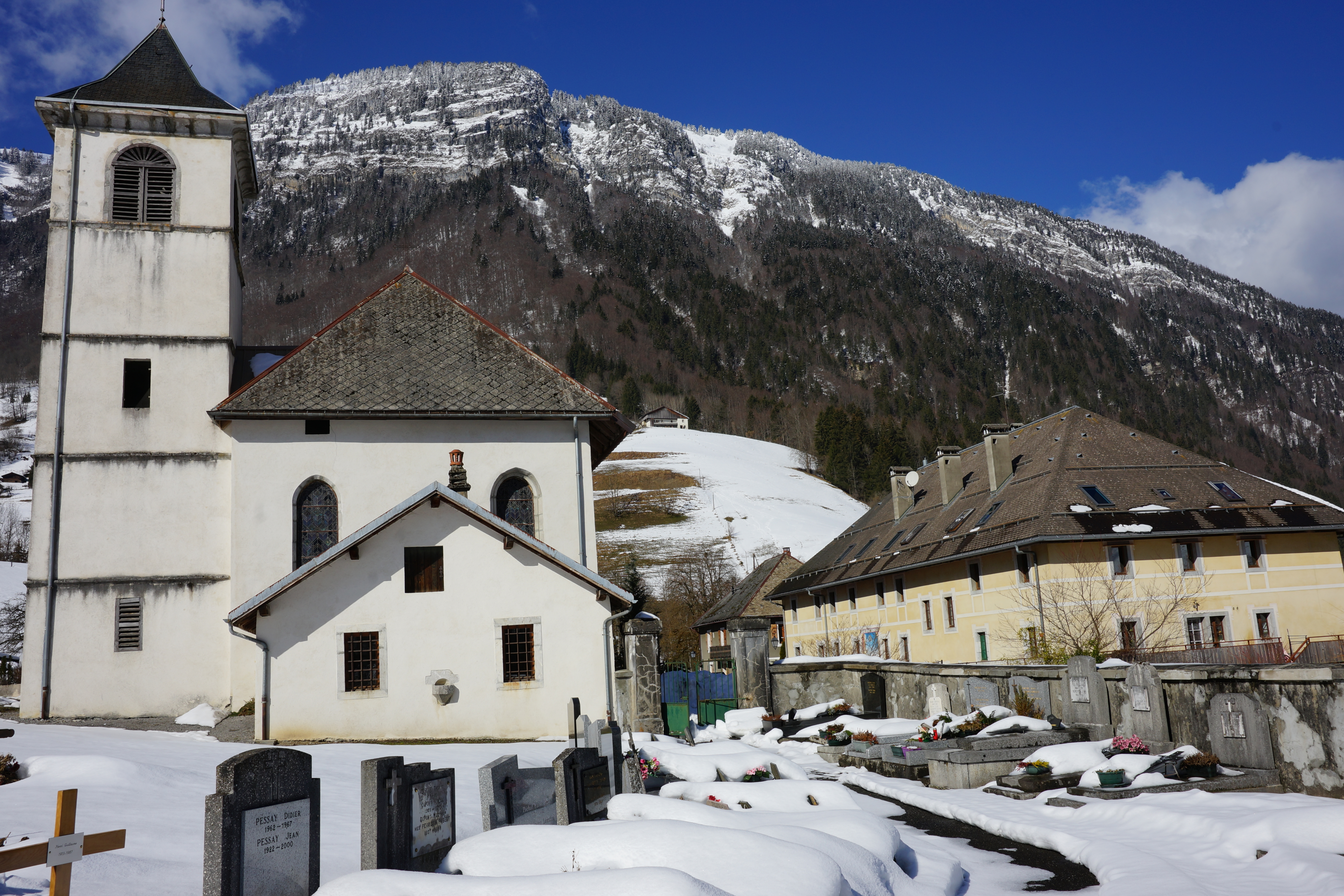 Vue arrière de l'église "Notre Dame de tous les Saints" depuis le cimetière - A droite, l'Abbaye - En arrière plan "la montagne des Auges (1822 m)"